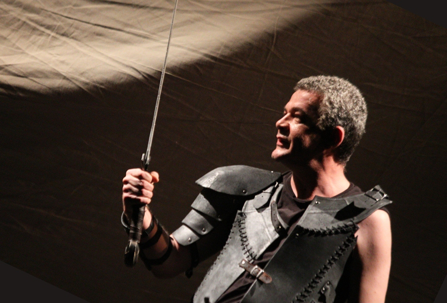 Nebojša Glogovac kao Hamlet u istoimenoj predstavi